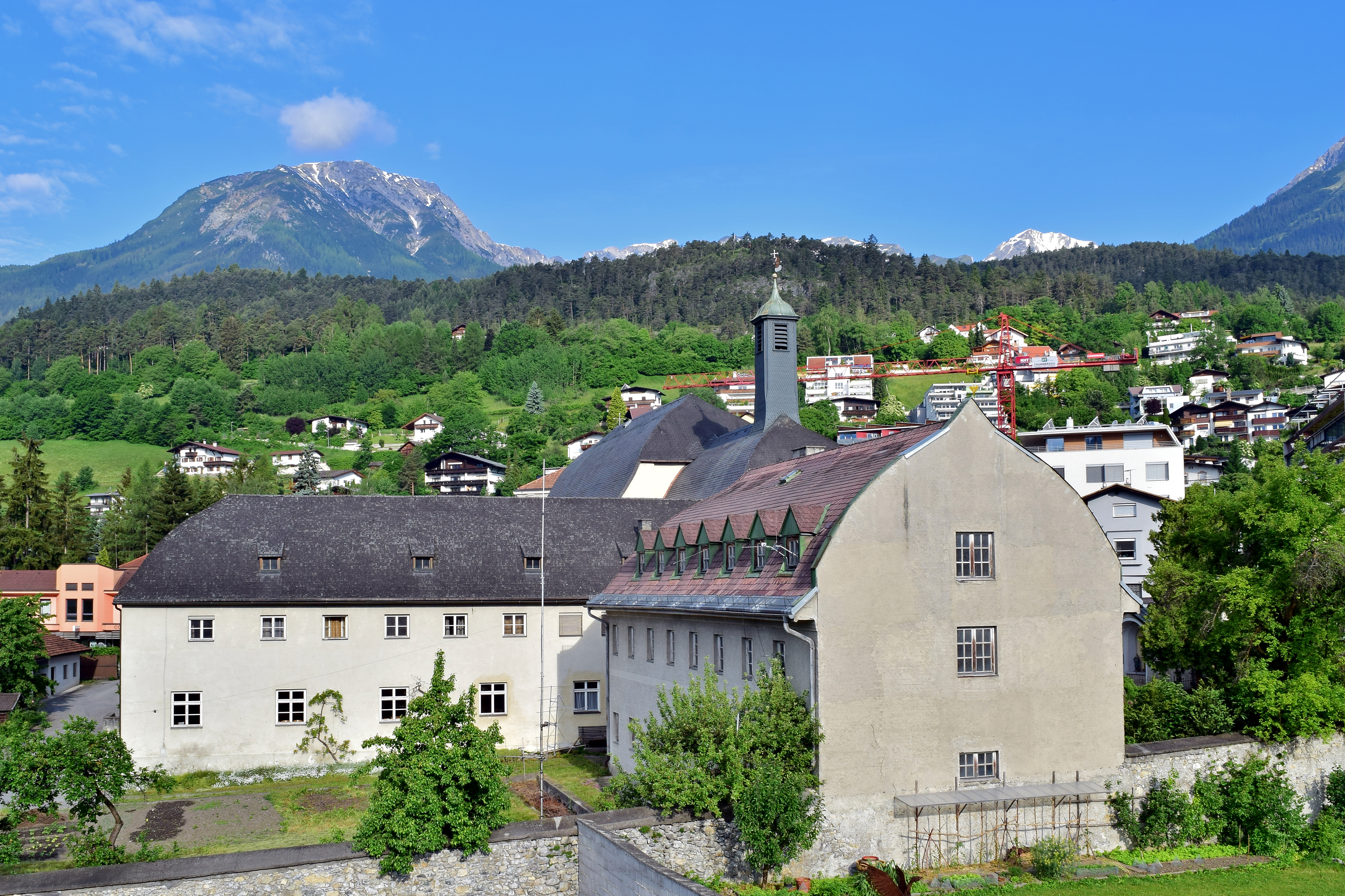 Kapuzinerkloster und Kirche hl. Josef mit Gartendenkmalen, künstlichen Wegsystemen und Ummauerung, mit Blickrichtung Westnordwest. Im Hintergrund links der Gipfel des Laaggers' (2328 m), direkt oberhalb des im Bildmittelgrund befindlichen Waldrückens erkennt man Ödkarlekopf (2565 m) und Muttekopf (2774 m)